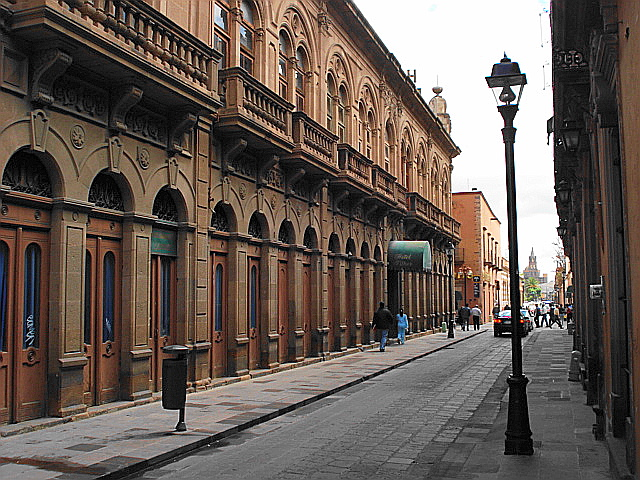 Calle Universidad en el Centro Historico de la ciudad de San Luis Potosí.